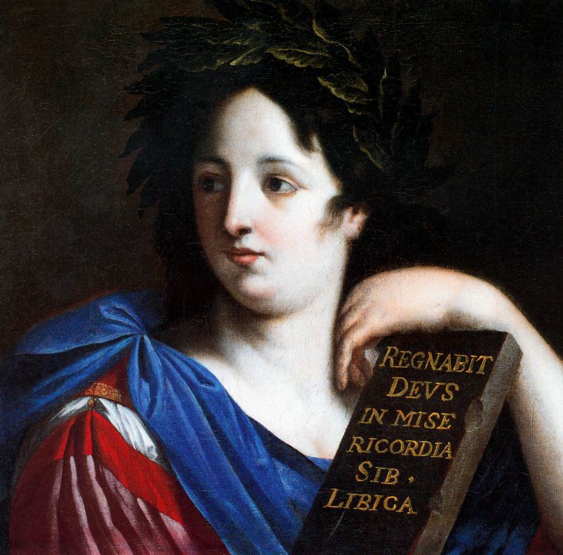 Sibila Líbicatitle QS:P1476,es:"Sibila Líbica" label QS:Les,"Sibila Líbica"